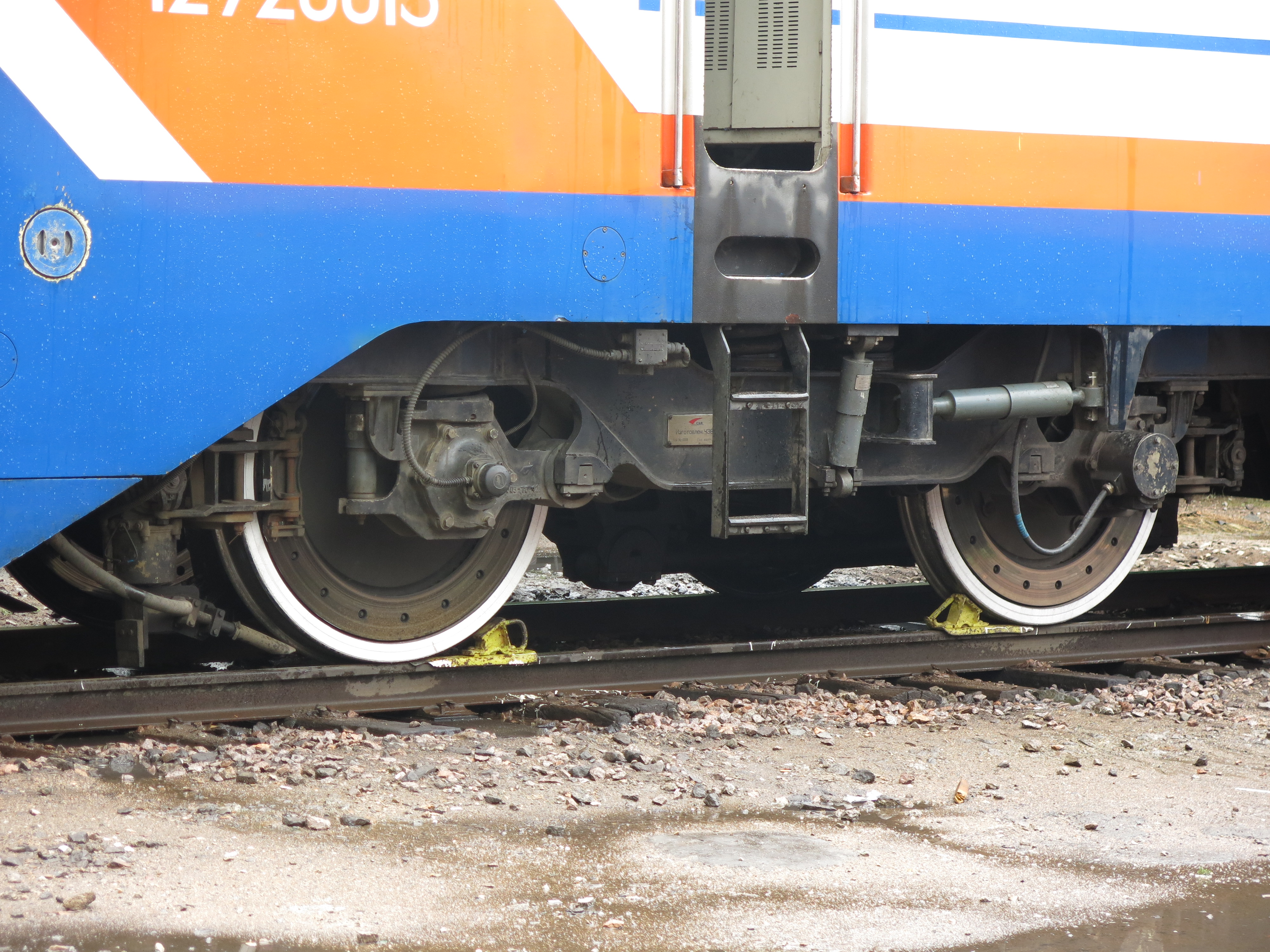 kz4a_bogie